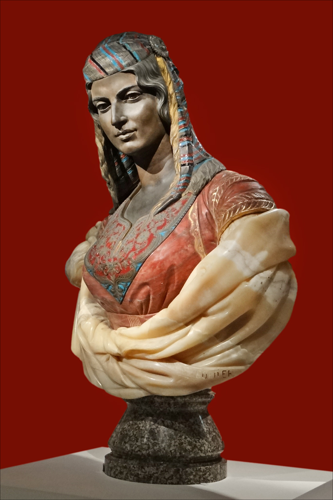 "Une juive d'Alger" 1872-1879 Oeuvre de Charles Cordier (1827-1905) Bronze, bronze émaillé, marbre, onyx et porphyre CNAP (Centre National des Arts Plastiques) en dépôt au musée Saint-Loup de Troyes Charles Cordier exposa au Salon de 1857 dix-huit bustes dont douze sont des études d'algérien, la plupart en bronze. Son intérêt pour la couleur, que l'on retrouve dans toutes les œuvres ci-dessus, l'amena souvent à mélanger les matériaux ; il réalisa ainsi de nombreuses œuvres combinant marbre, onyx, et bronze. Il alla encore plus loin en envoyant au Salon de 1863 le buste d'une femme juive algérienne en bronze émaillé, onyx et porphyre,.... Extrait de l'article de Wikipedia sur Charles Cordier